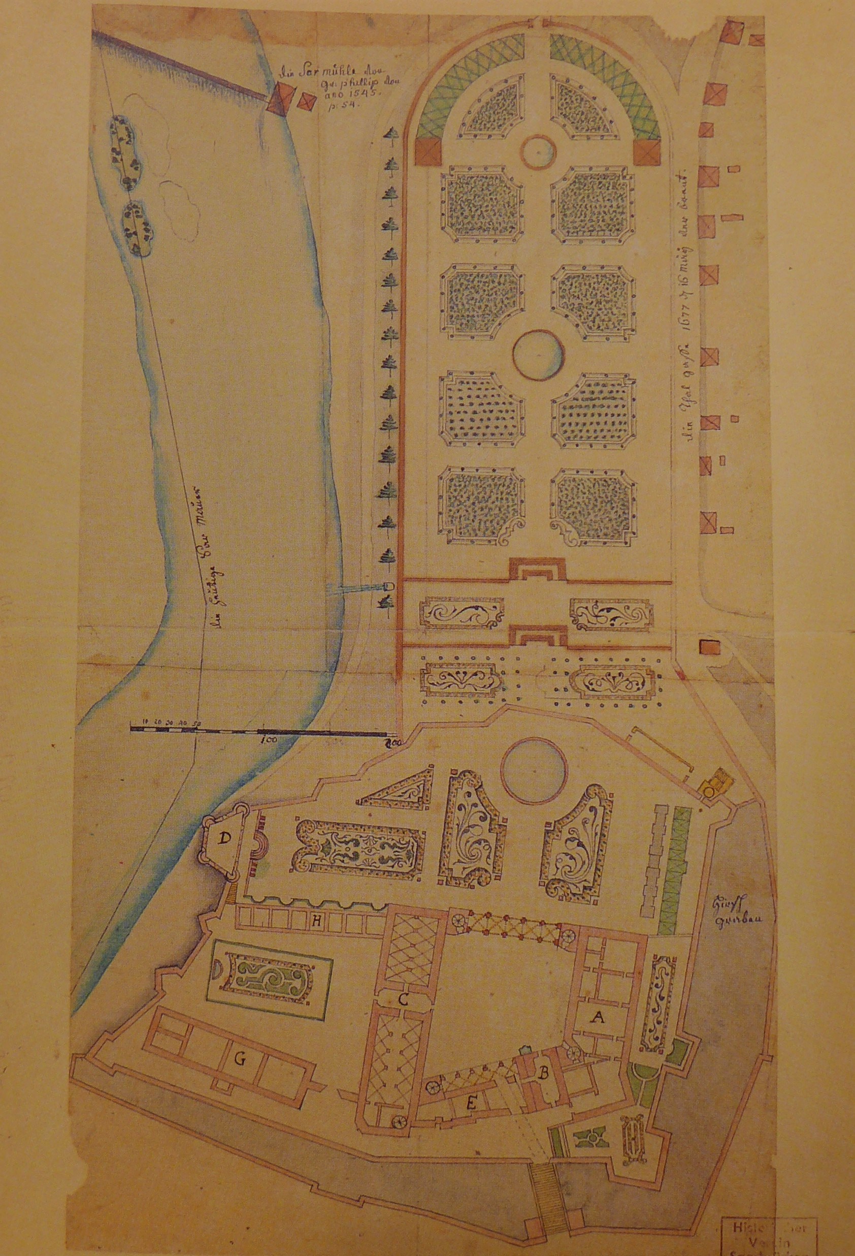 Plan des Saarbrücker Schlosses mit Schlossgarten vor dem barocken Neubau des 18. Jahrhunderts, Zeichnung von Friedrich Köllner (Landesarchiv Saarbrücken)